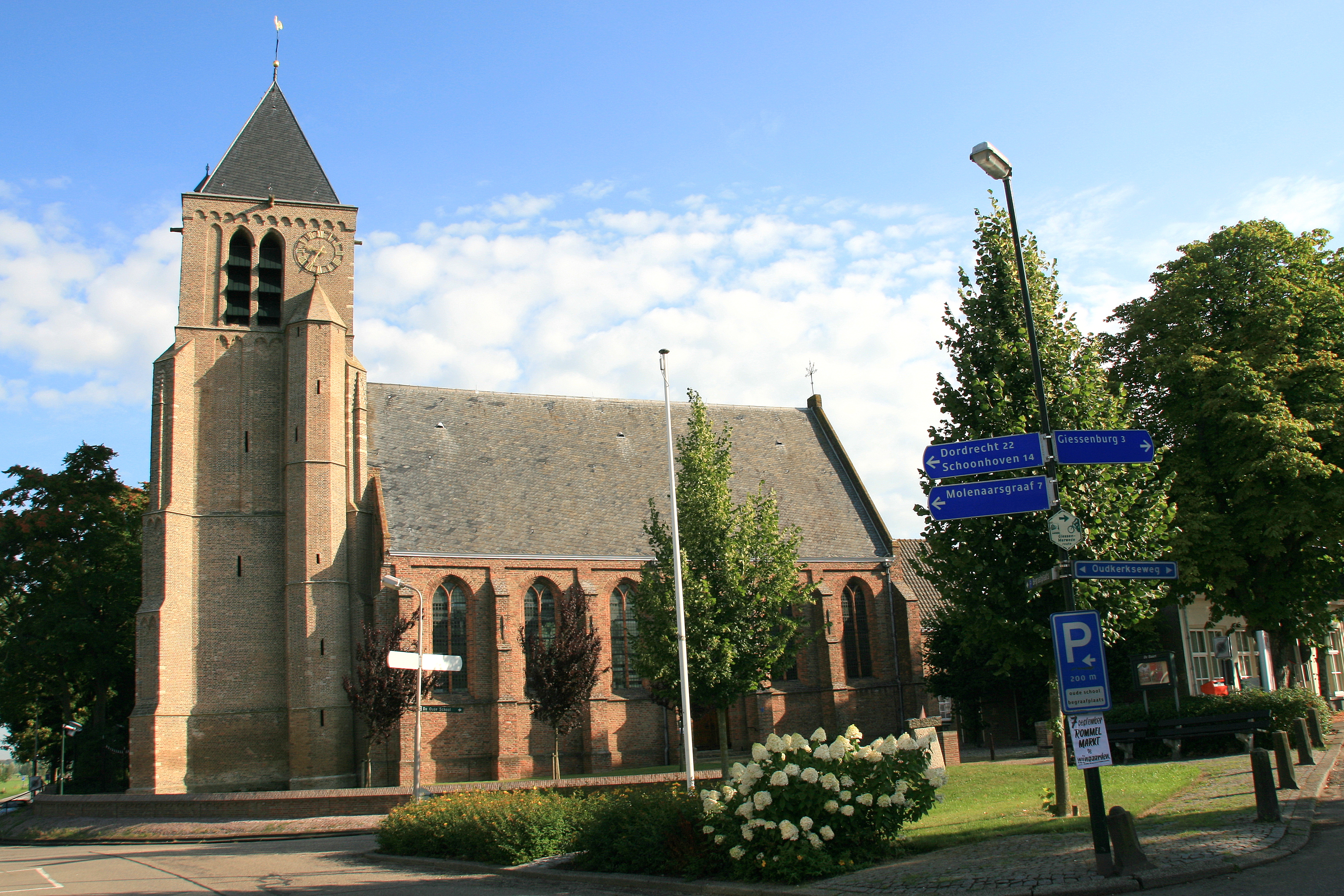 De Hervormde kerk is een eenbeukige kerk met aangebouwde consistorie en een forse toren van vier geledingen met tentdak. Het eind 15de eeuw gebouwde schip in laatgotische vormen onderging in 1657 een verbouwing. Het koor werd in 1838 gesloopt en vervangen door een consistorie (herbouwd 1950). Restauraties zijn uitgevoerd in 1950-'52.